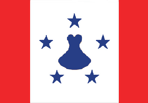 Bandera de les illes Australs